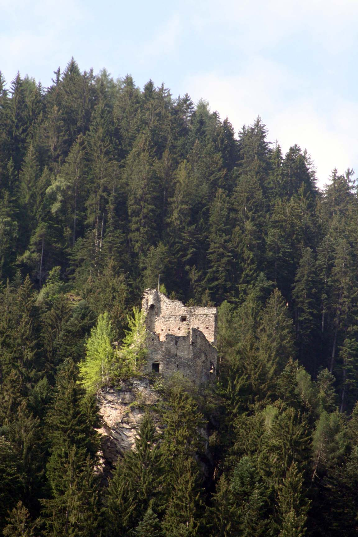 Obertagstein Lage